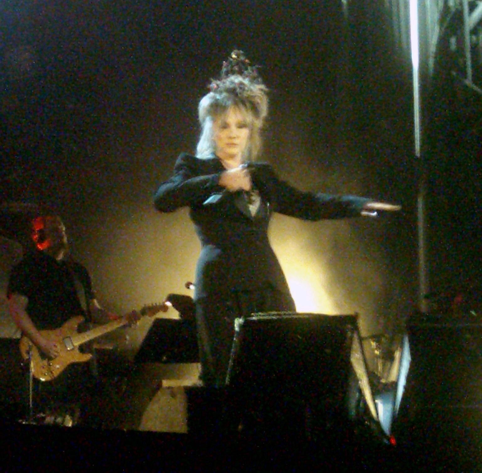 Diane Dufresne lors du spectacle Sinéquanone présenté aux FrancoFolies de Montréal